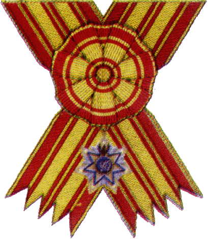 Орден Звезды Индонезии первого класса